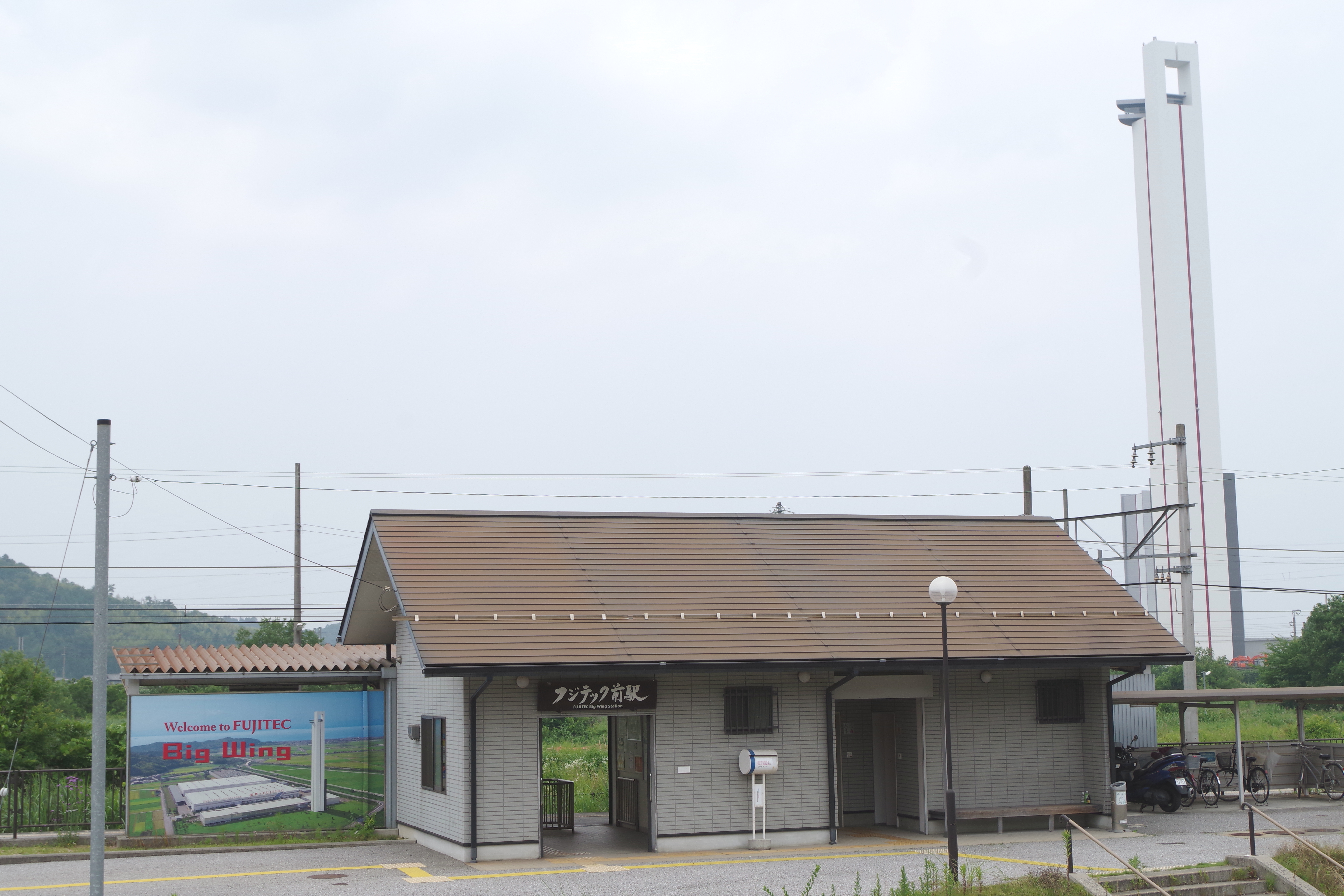 近江鉄道本線 フジテック前駅 駅舎